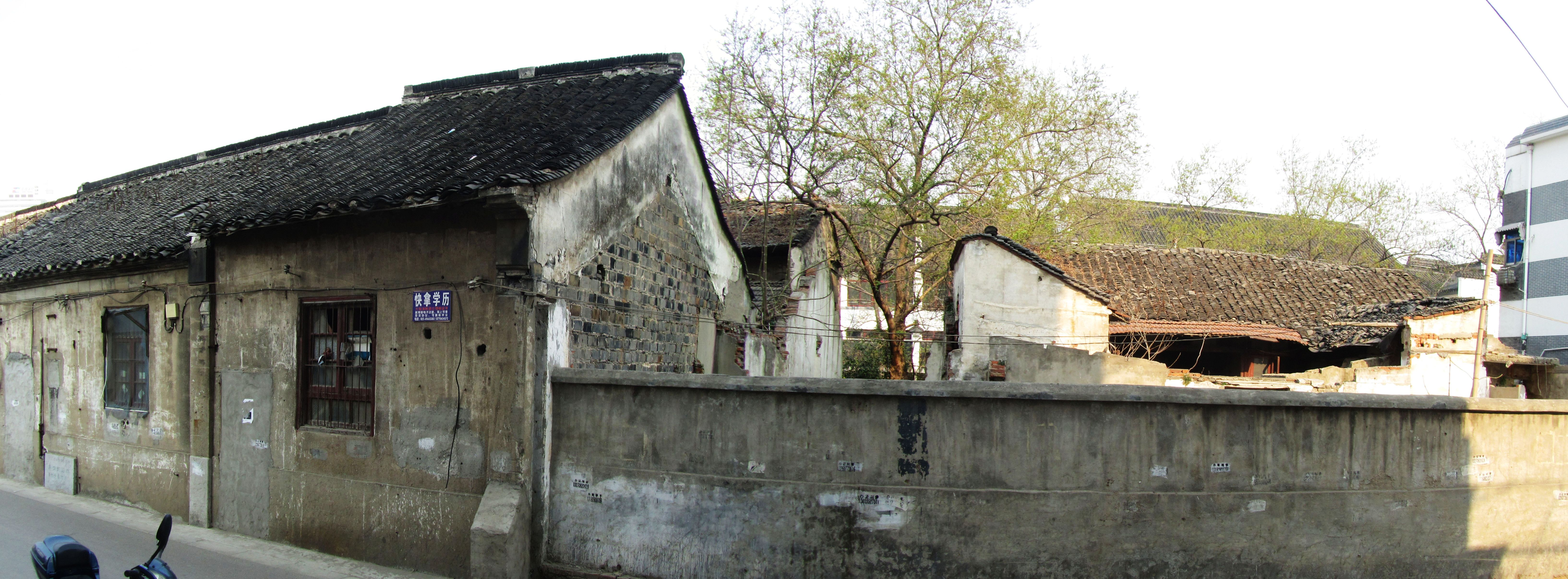 南京钓鱼台河房，自南侧马路上看，全景。